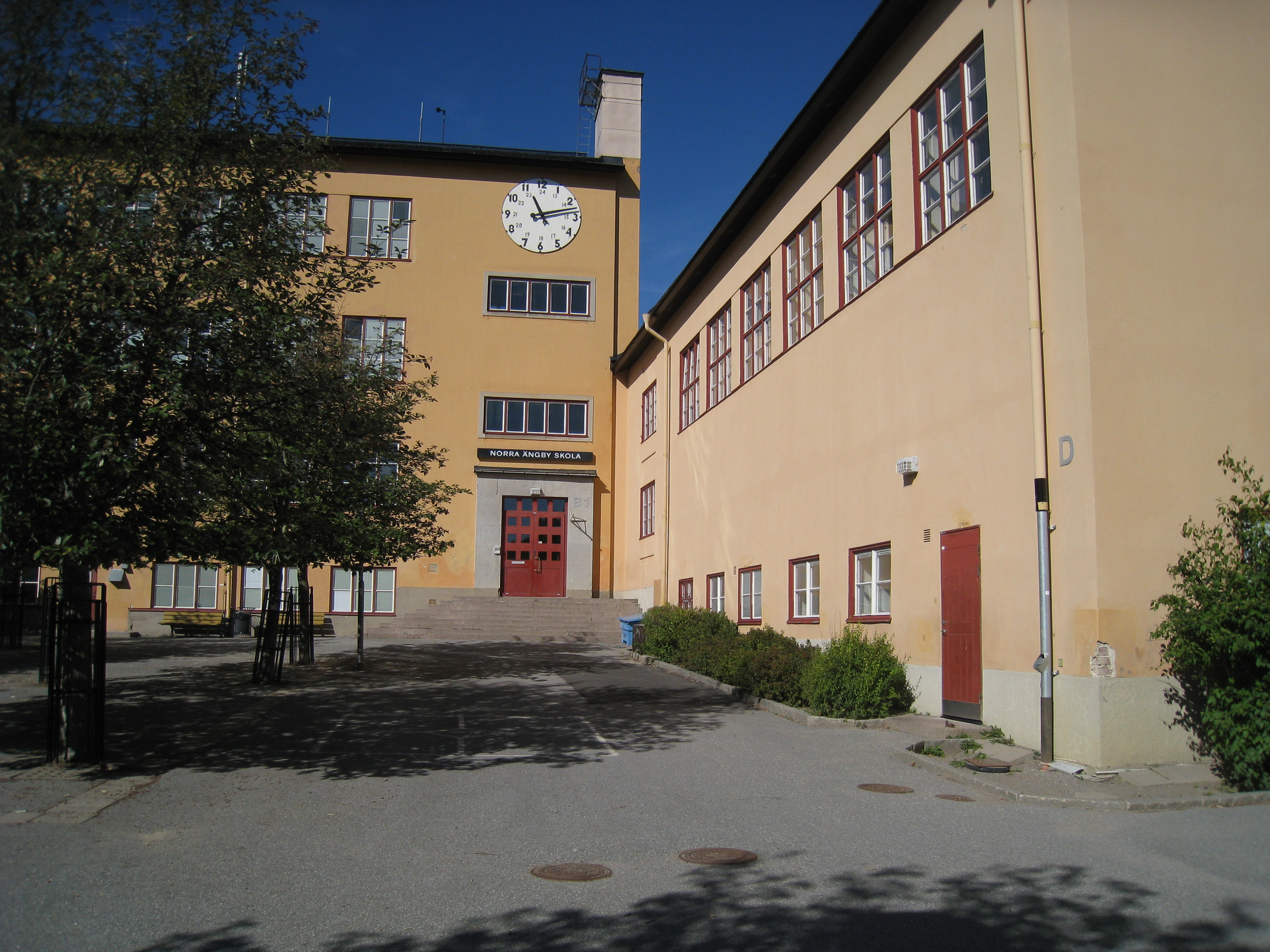 Norra Ängby skola i Bromma, väster om Stockholm. Entrédörr med ingång B1, skylt med "NORRA ÄNGBY SKOLA" och skolklocka på fasaden. Skolan ligger på Vultejusvägen 20 i Norra Ängby och byggdes 1936. Arkitekt var Ture Ryberg.